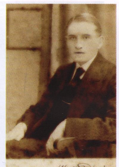 Беларуская (тарашкевіца): Альбін Дзяконскі